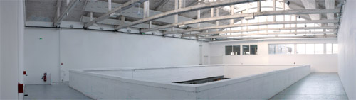 vue de la mezzanine